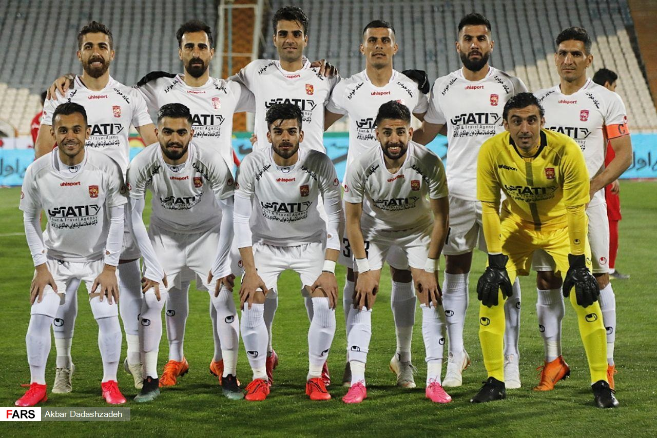 برد پرسپولیس مقابل شهرخودرو در ورزشگاه آزادی